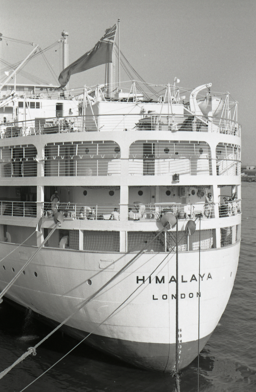 Napoli, porto. Capri dal battello. Serie fotografica : Napoli, 1962 / Paolo Monti. - Strisce: 4, Fotogrammi complessivi: 13 : Negativo b/n, gelatina bromuro d'argento/ pellicola ; 35 mm. - ((I fotogrammi hanno una doppia numerazione. - Sul portanegativi: Plus X. - Fonte: Agenda di Paolo Monti: Foto Leica 1 / 1-51 verde, 1-110 nera (1958-1963), presso Archivio Paolo Monti